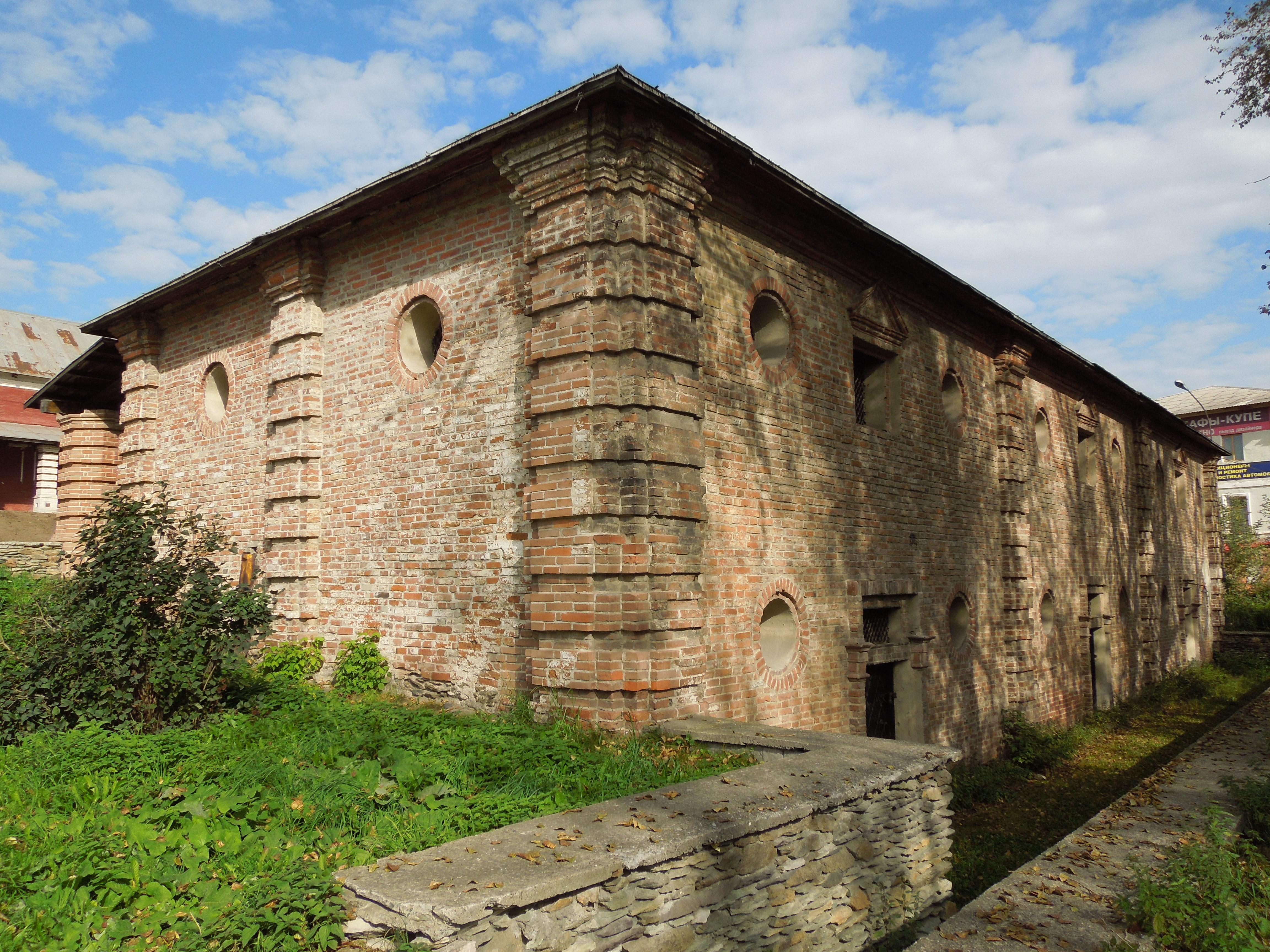 Здание провиантских складов (Свердловская область, Нижний Тагил, уральская улица, 1)